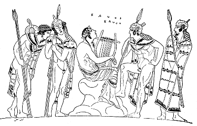 Red-figured column krater (Berlin V.I. 3172) found in Gela, Sicily, depicting Orpheus surrounded by Thracian warriors, dressed in zeiras; «amphore attique, trouvée à Géla : on y voit Orphée jouant de la lyre, assis sur un rocher, regardant le ciel, et entouré de quatre guerriers thraces, en costume national, qui l'écoutent avec surprise»